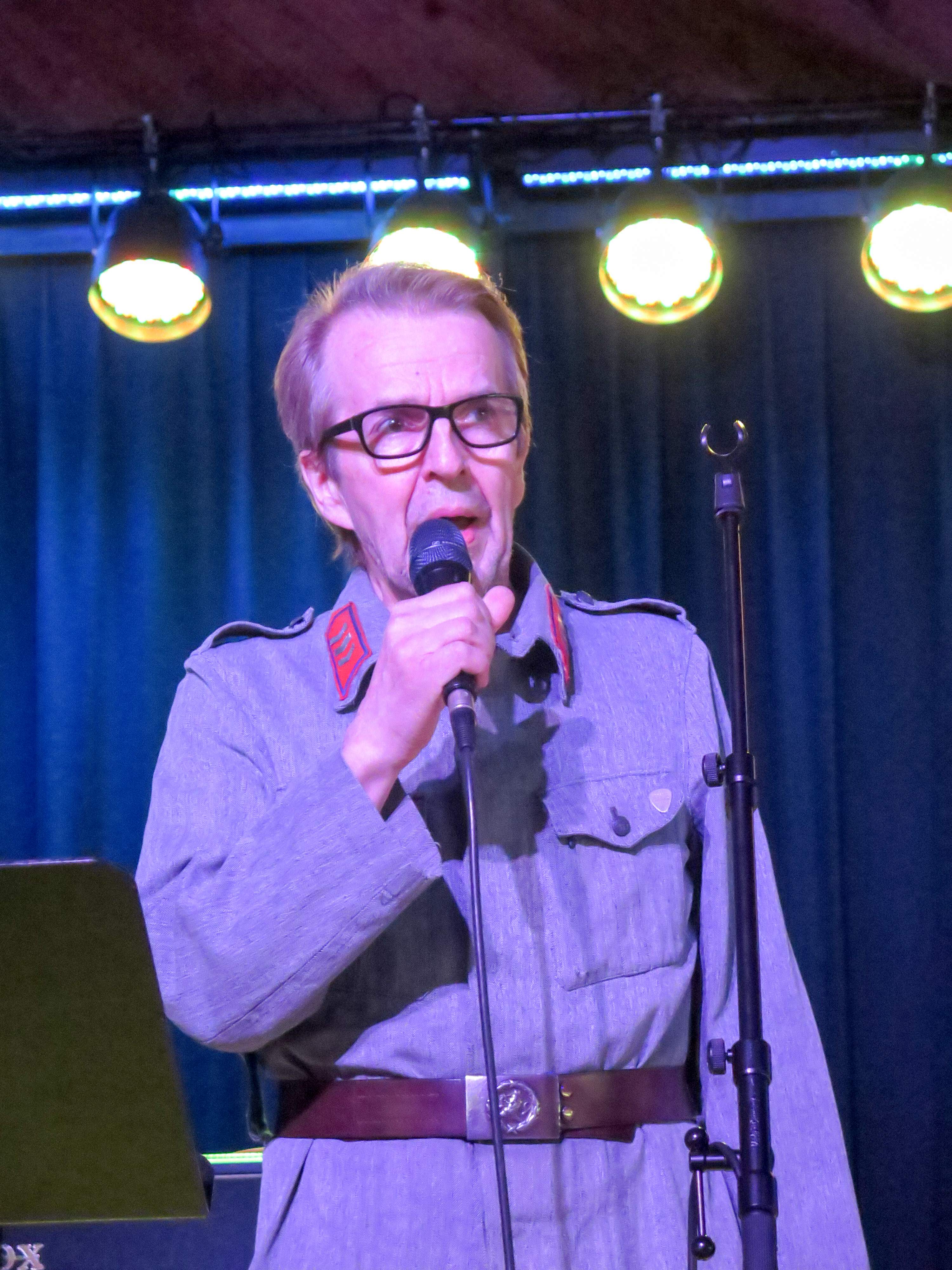 Ami Varjotie suomalainen laulaja